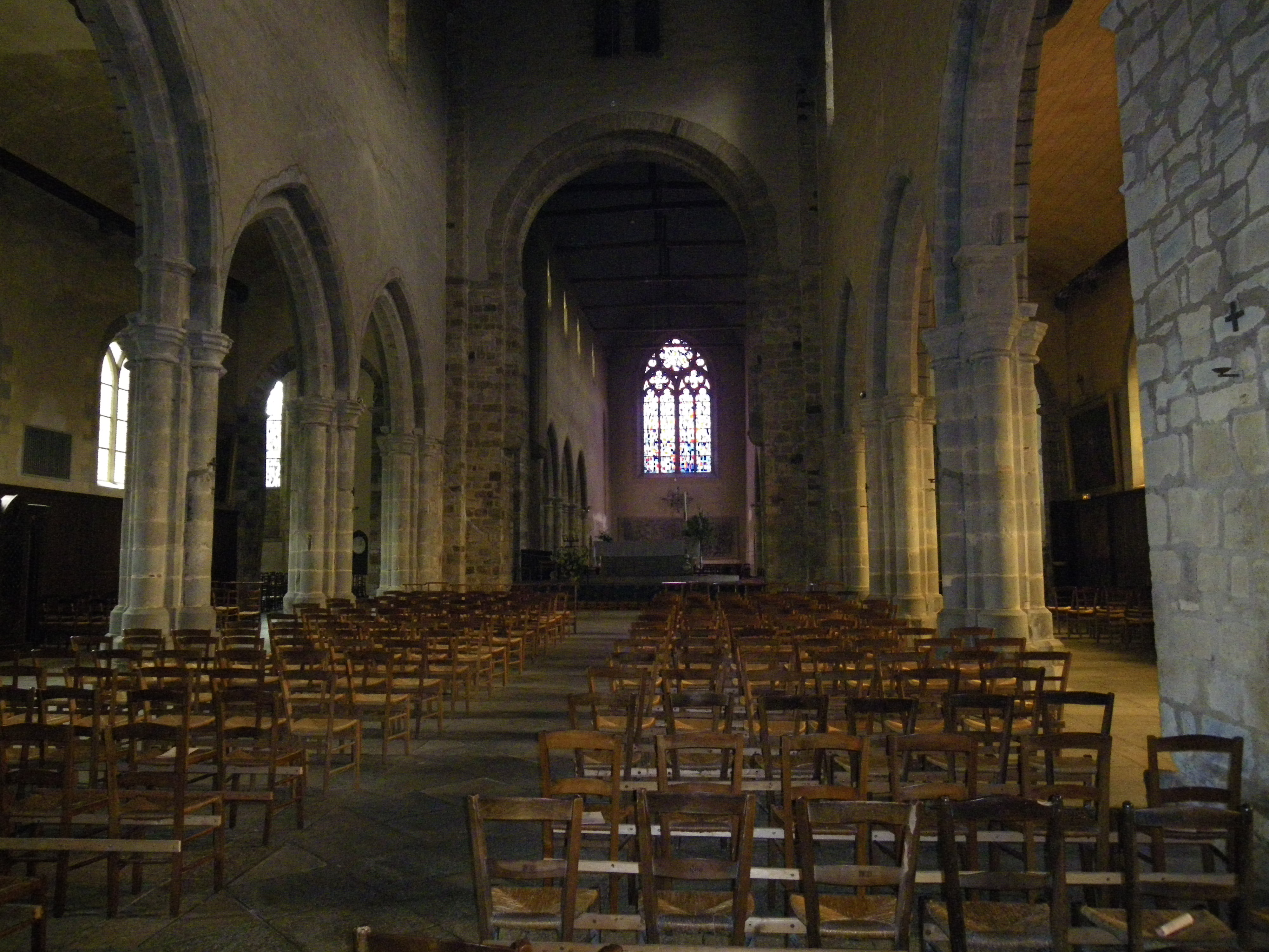 egNef principale de l'église Notre-Dame en Saint-Melaine à Rennes (35).